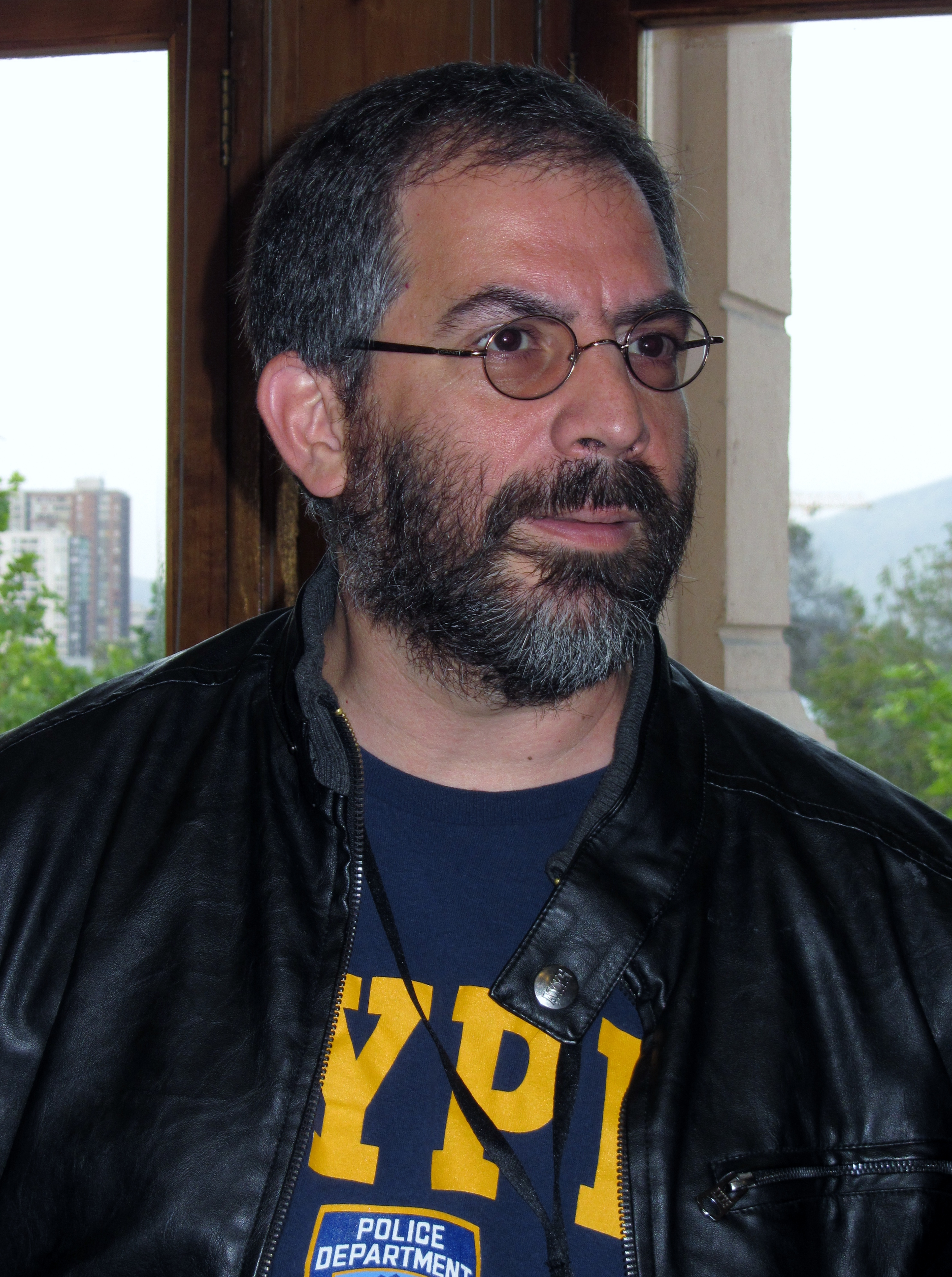 El escritor peruano Enrique Planas en la Feria Internacional del Libro de Santiago 2015